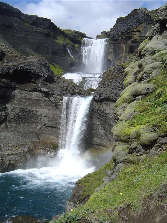 Ófærufoss, Eldgjá, Iceland